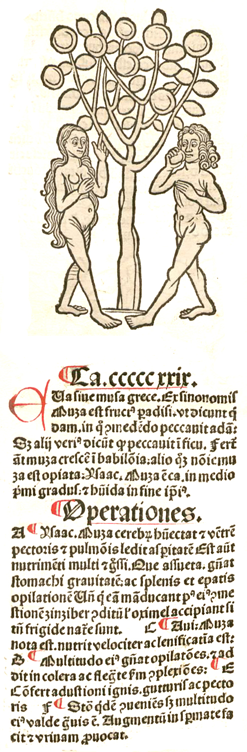 Abbildung des Paradiesbaums